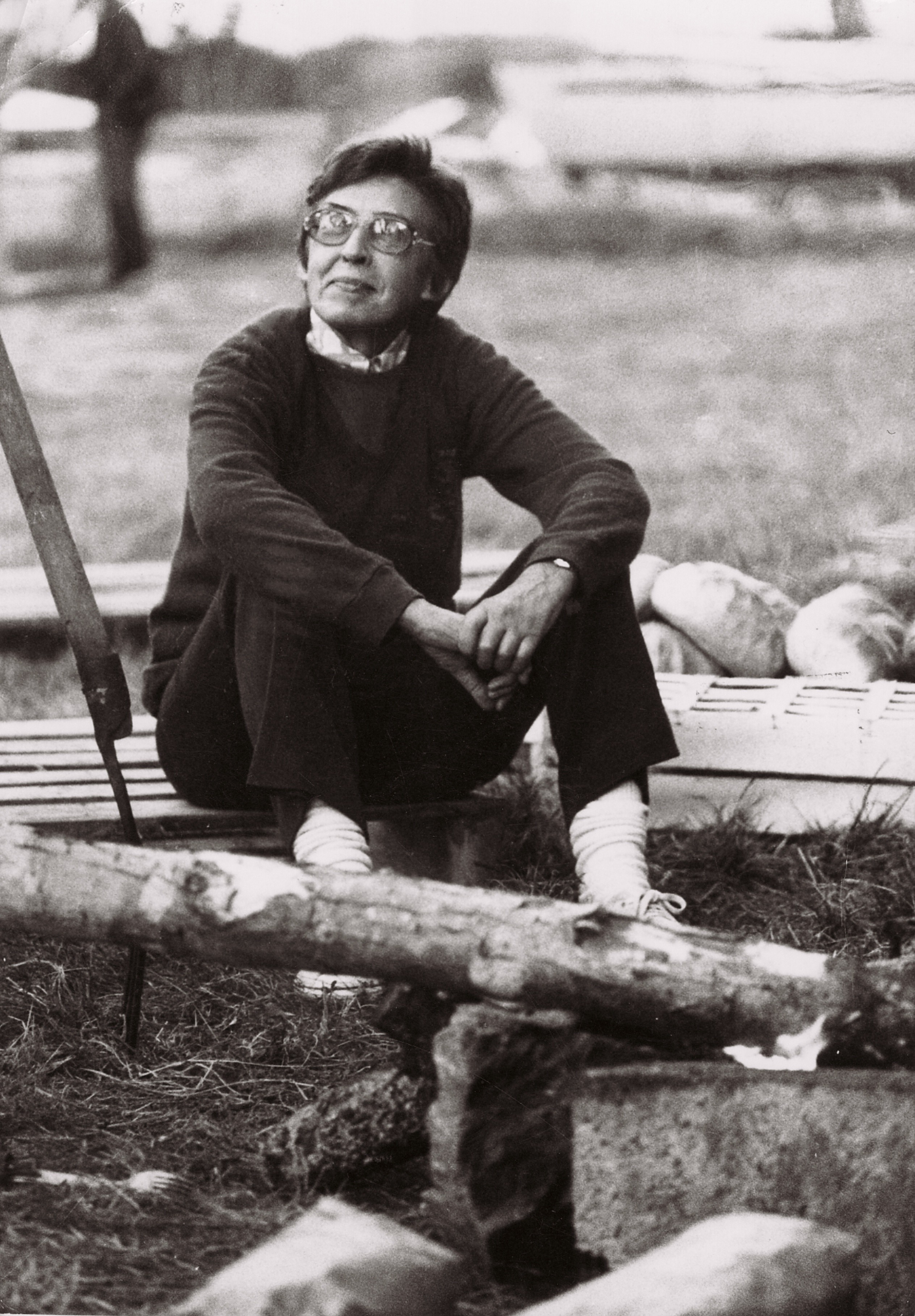 Hélène Viannay assise par terre sur une base des Glénans